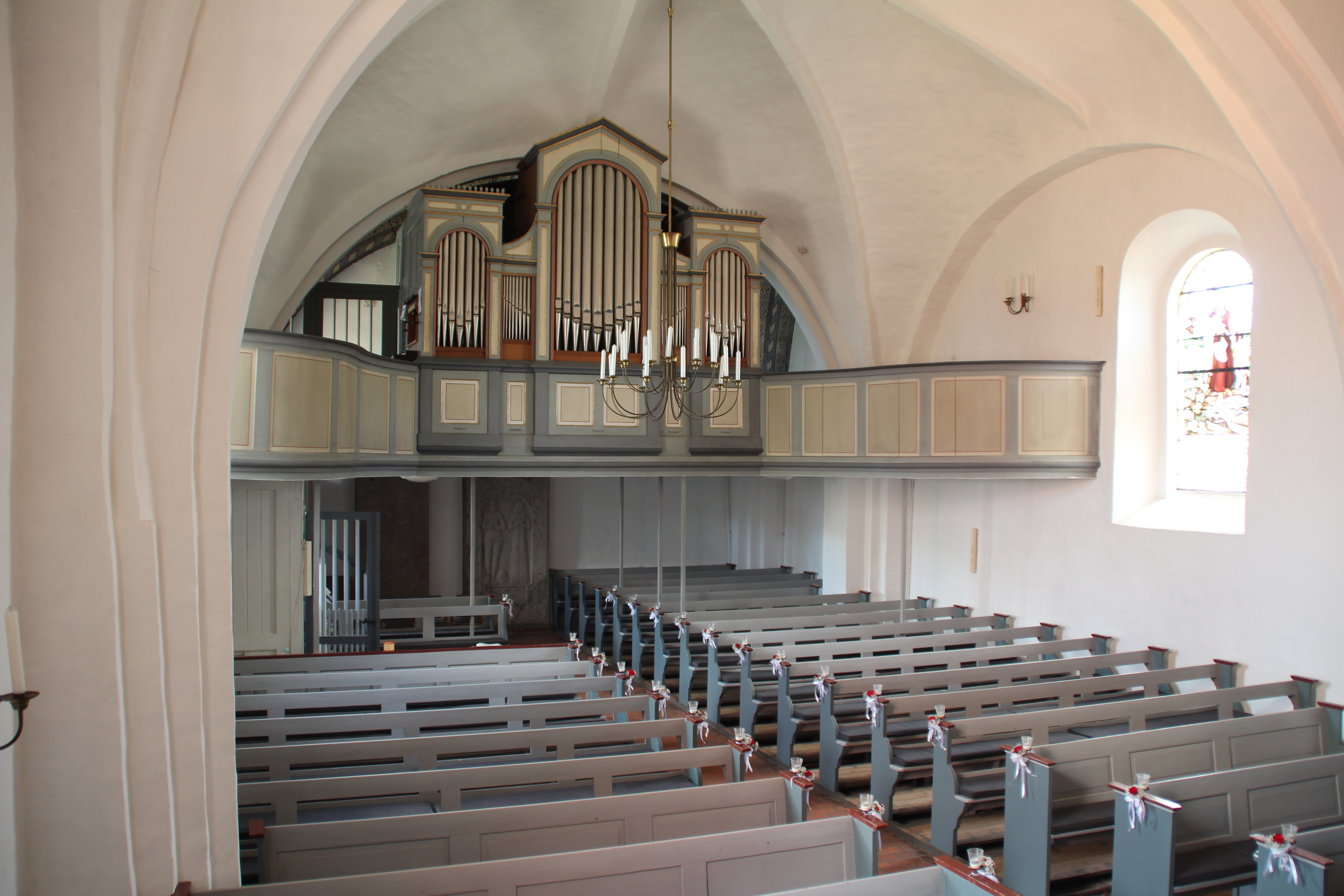 Kirchenschiff der St. Petri-Kirche zu Rieseby mit Orgelempore und Marcussen-Orgel